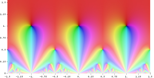 Eisenstein series G_6